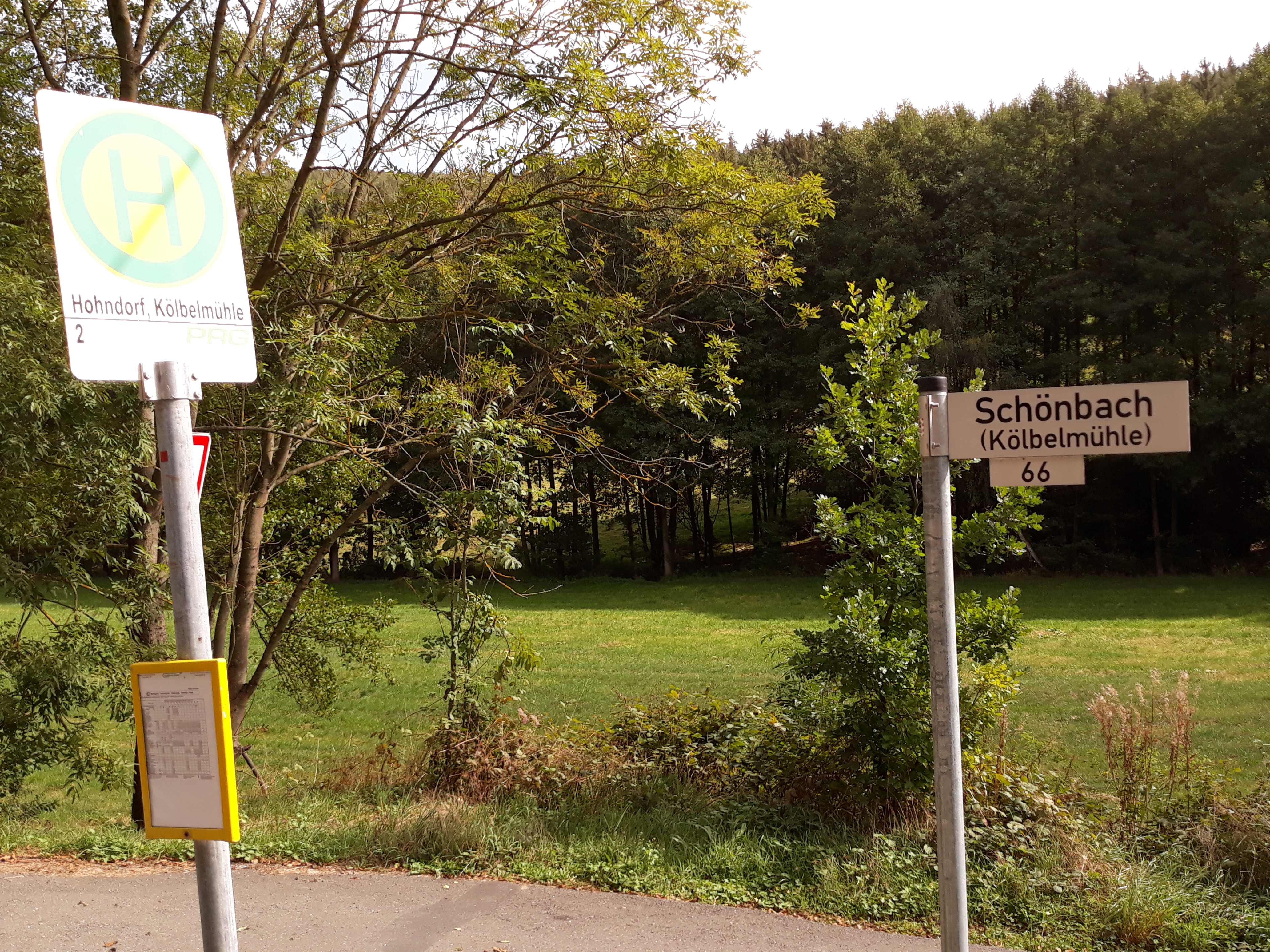 Straßenschild (Zugehörigkeit zu Schönbach) und Haltestellenschild (Zugehörigkeit zu Hohndorf) der Einzelsiedlung Kölbelmühle der Stadt Greiz